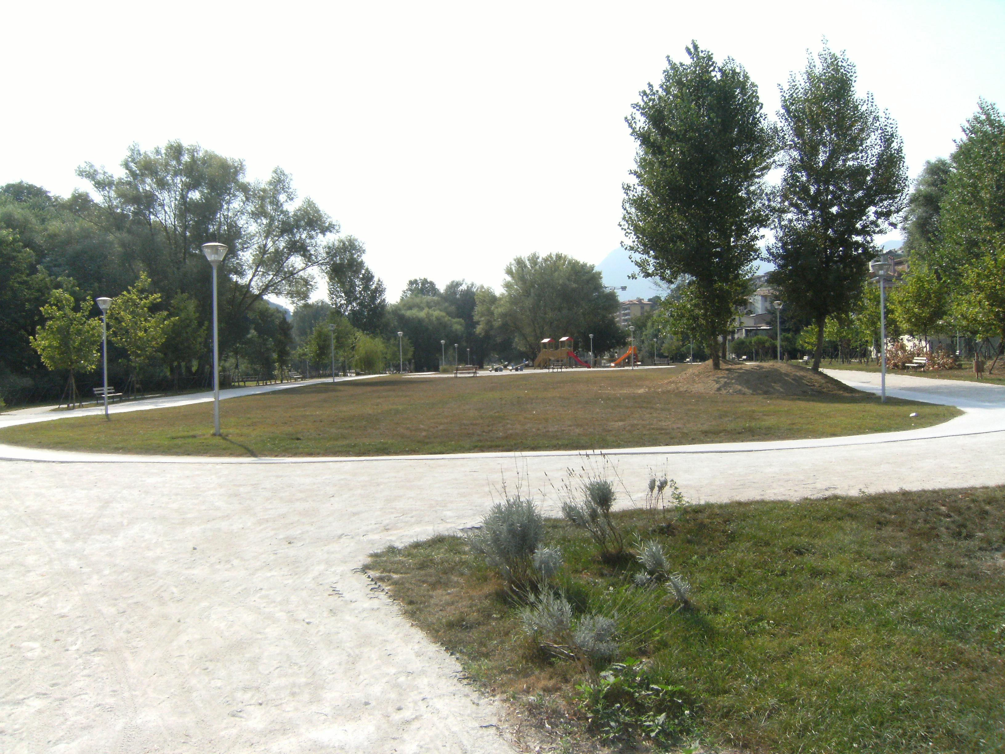 Parco di Santo Spirito ad Avellino (via "F. Tedesco").